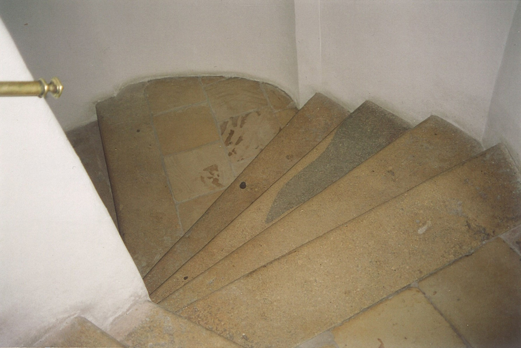 Kaisersteinstufen der ehem. Hofkammer, jetzt Universitätsbibliothek